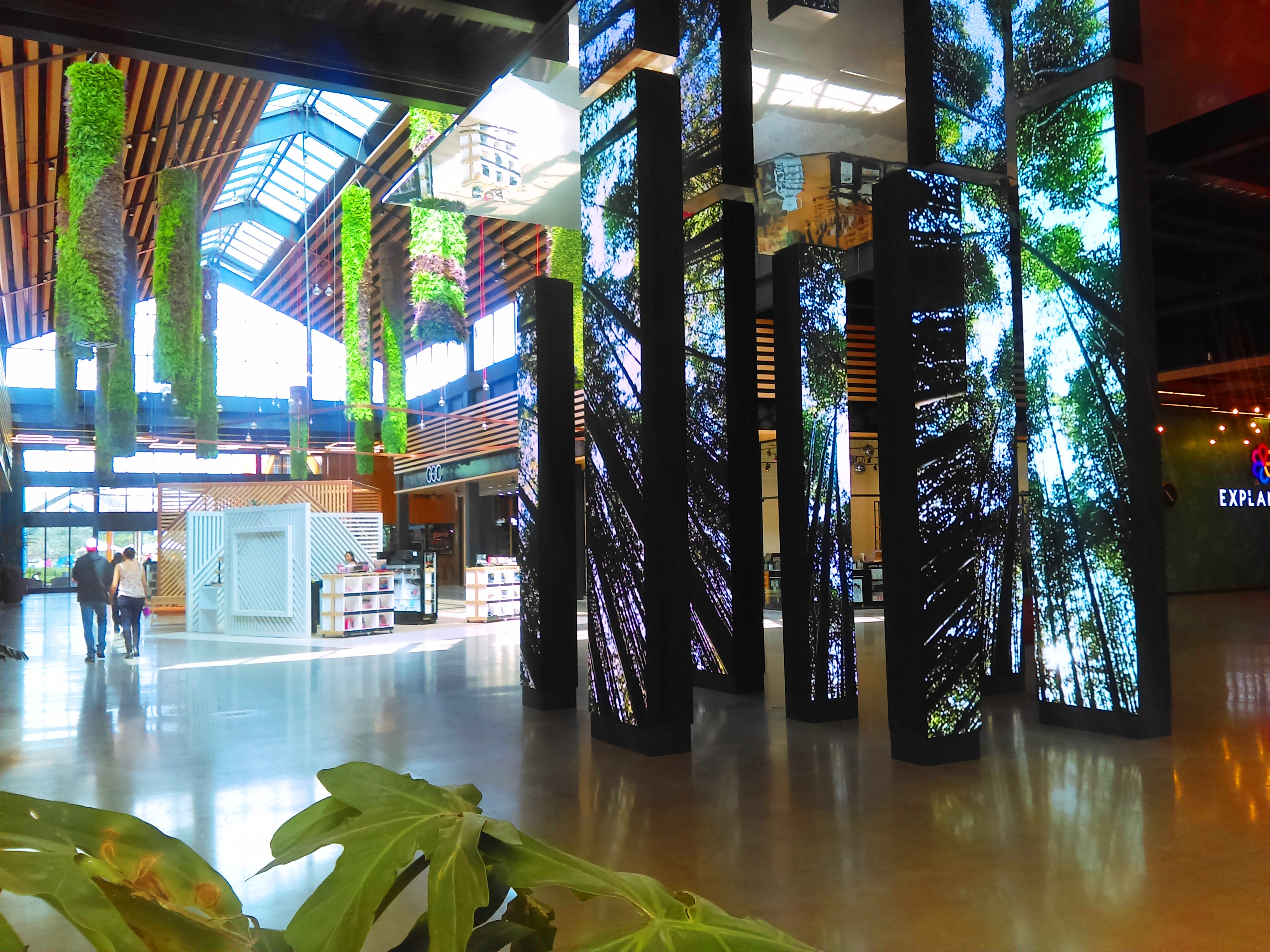 Explanada Pachuca